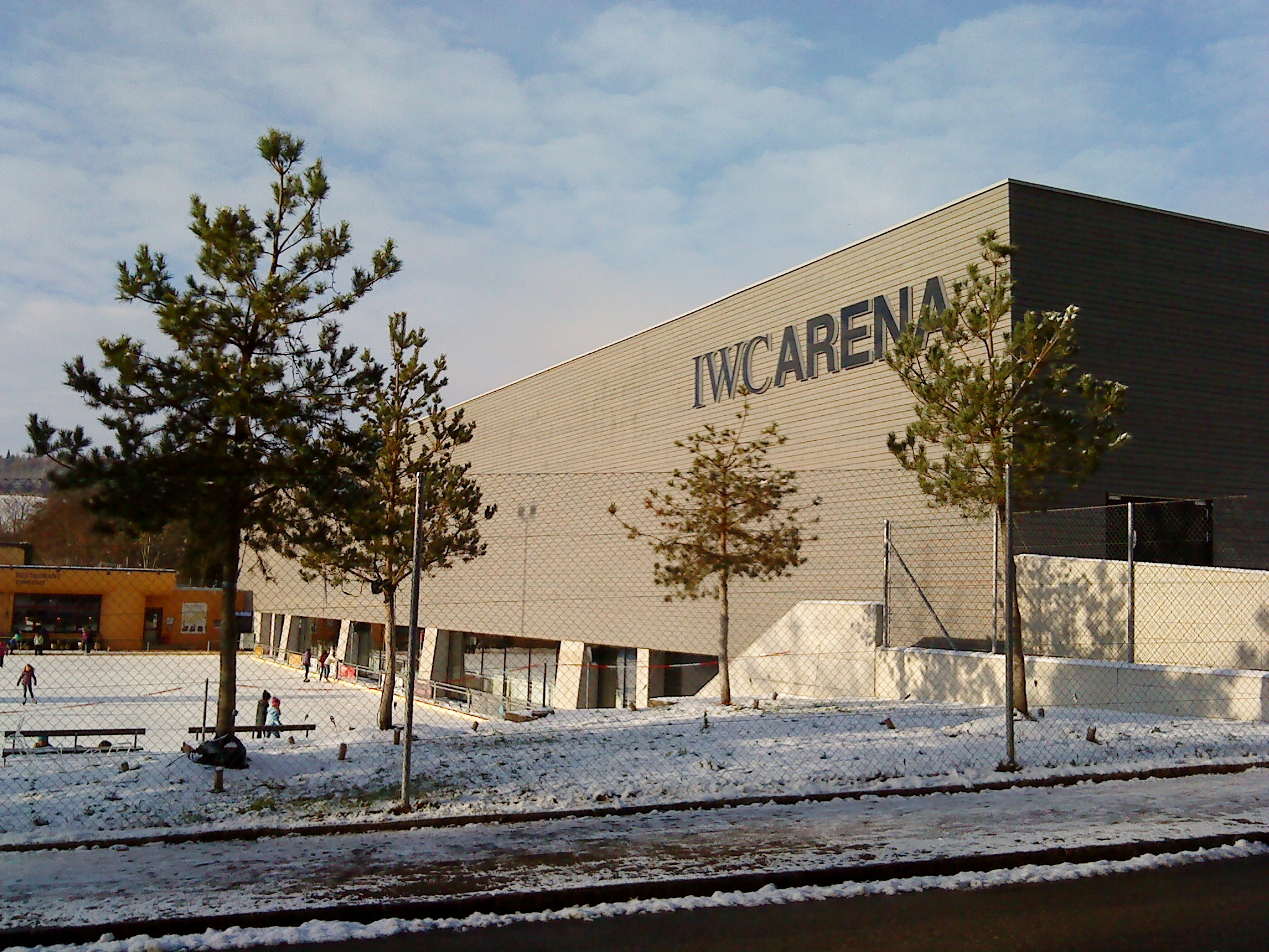 IWC Arena: Eishalle in Schaffhausen/Schweiz. Die Halle befindet sich auf dem Gelände des KSS Freizeitparks Schaffhausen. Die Schaffhauser Uhrenfirma IWC International Watch Co. AG ist Namensgeberin der Halle.